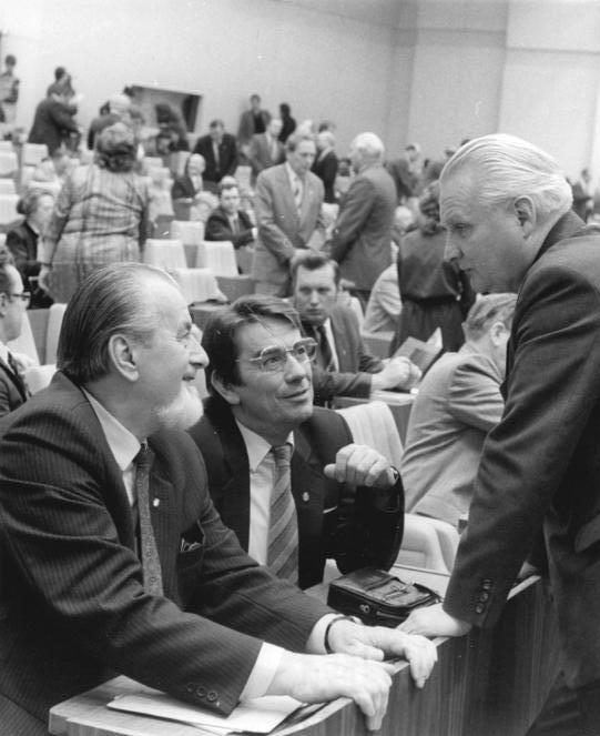 ADN-ZB/Mittelstädt-30.11.84-Berlin: Volkskammertagung Die Volkskammer der DDR trat in Berlin zu ihrer 10. Tagung zusammen. Pausengespräch zwischen den Abgeordneten der CDU-Fraktion Franz Kirchner, OMR. Dr. Werner Karwath und Hermann Kolb (v.l.n.r.).